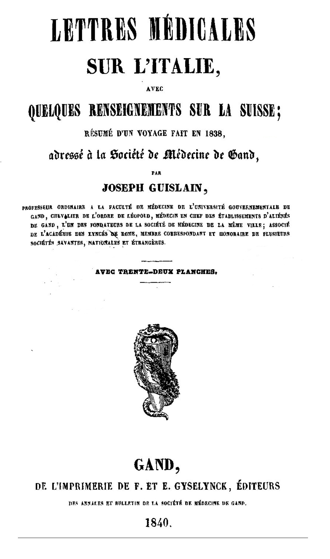 Couverture d'un livre du Dr Joseph Guislain. "Lettres médicales sur l'Italie avec quelques renseignements sur la Suisse: Résumé d'un voyage fait en 1838 adressé à la Société de Médecine de Gand."343p. Frères Gyselinck . Gand, 1840.